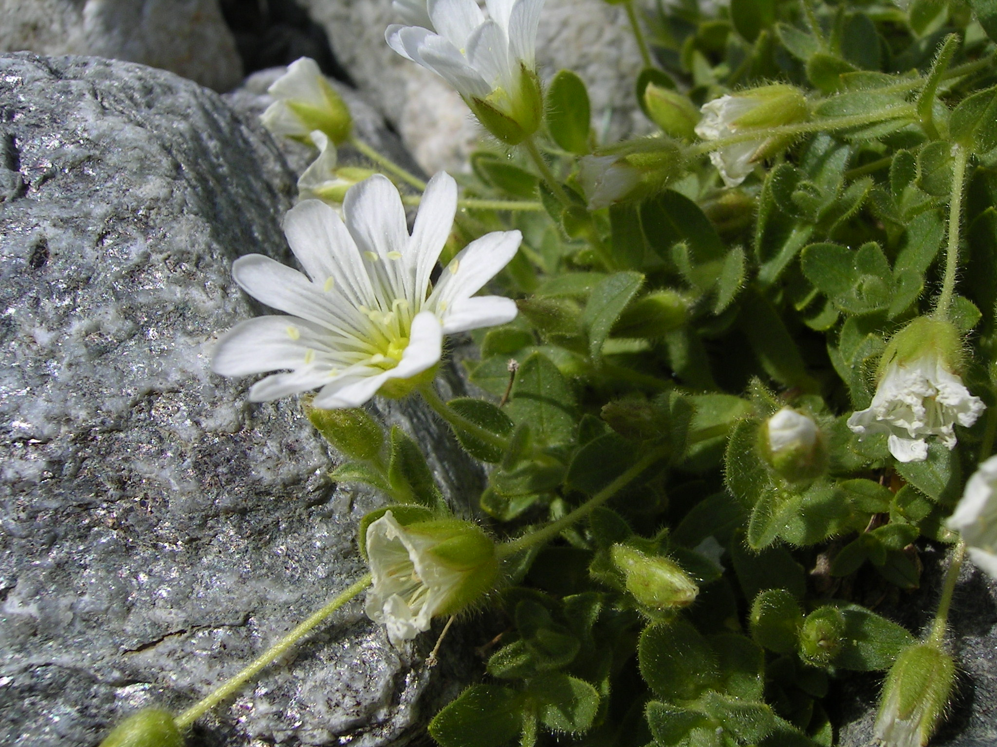 (en) Cerastium uniflorum (de) Einblütiges Hornkraut (Cerastium uniflorum) Place/Ort: Meiringen, Berner Oberland, CH. Irgendwo im Grimsel.